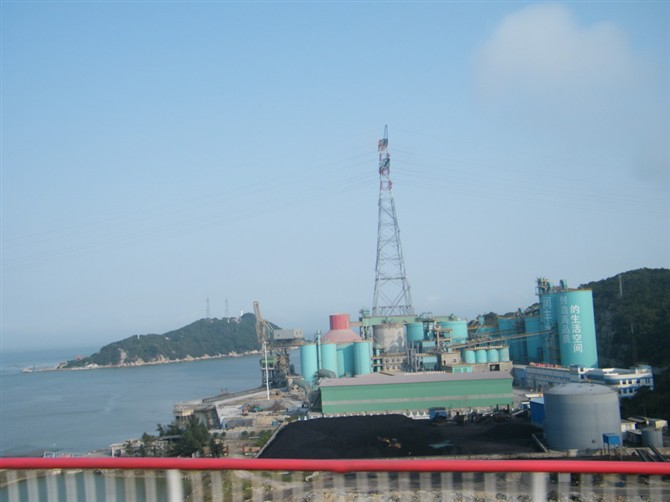 在澳头，汕头出海口南岸的华润水泥厂。